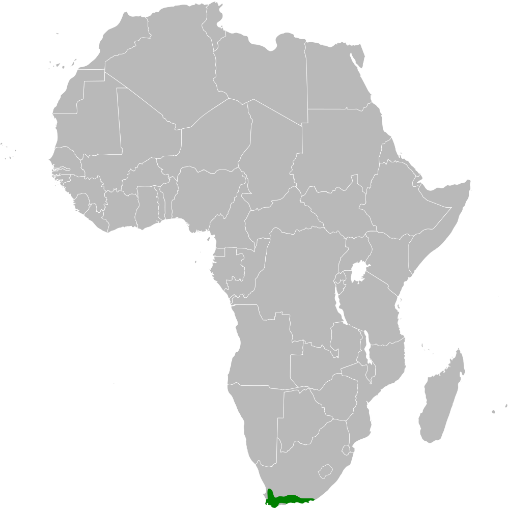 Cryptillas victorini distribution map, based on